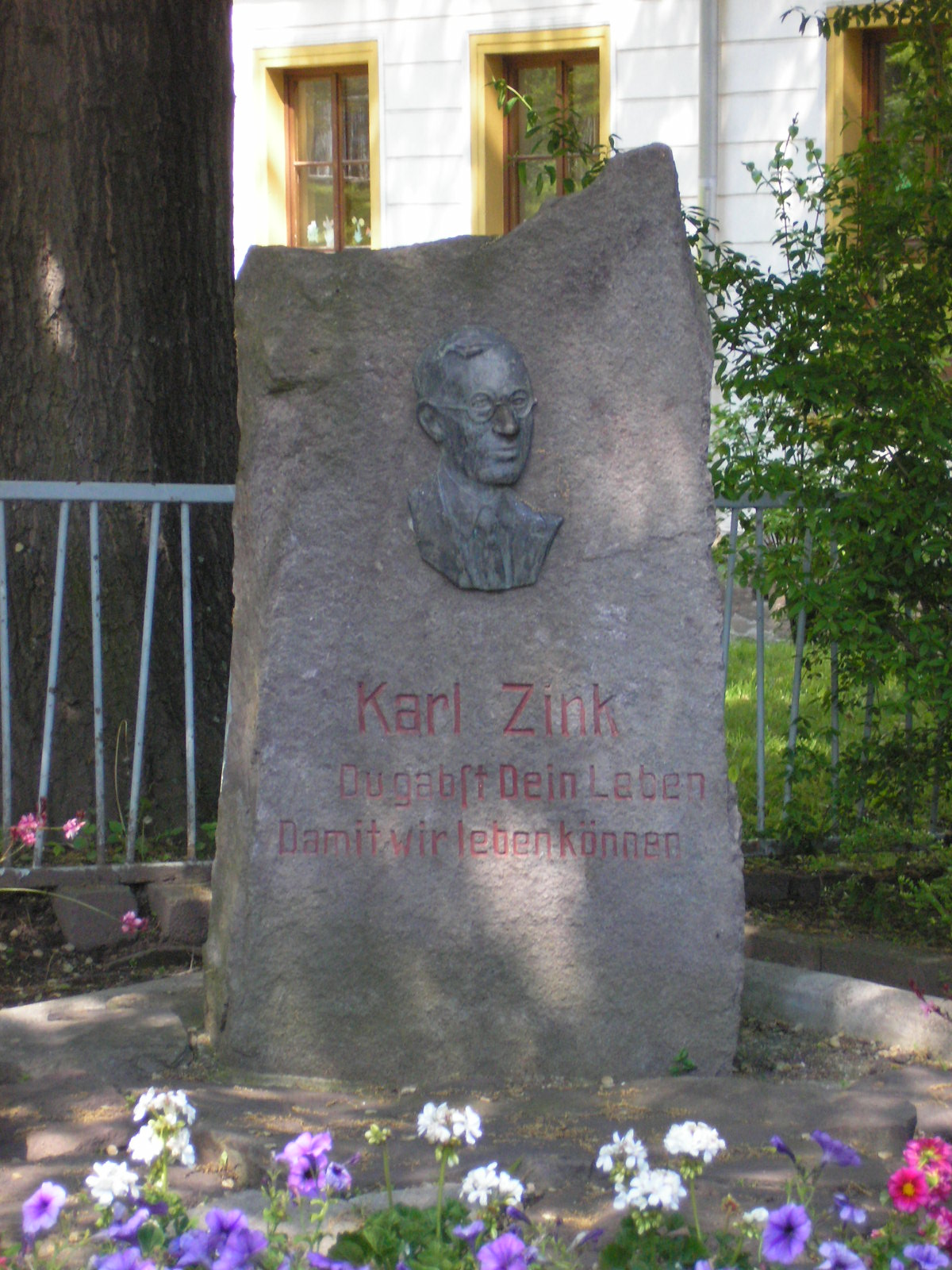 Denkmal zu Ehren Karl Zinks in Ilmenau.